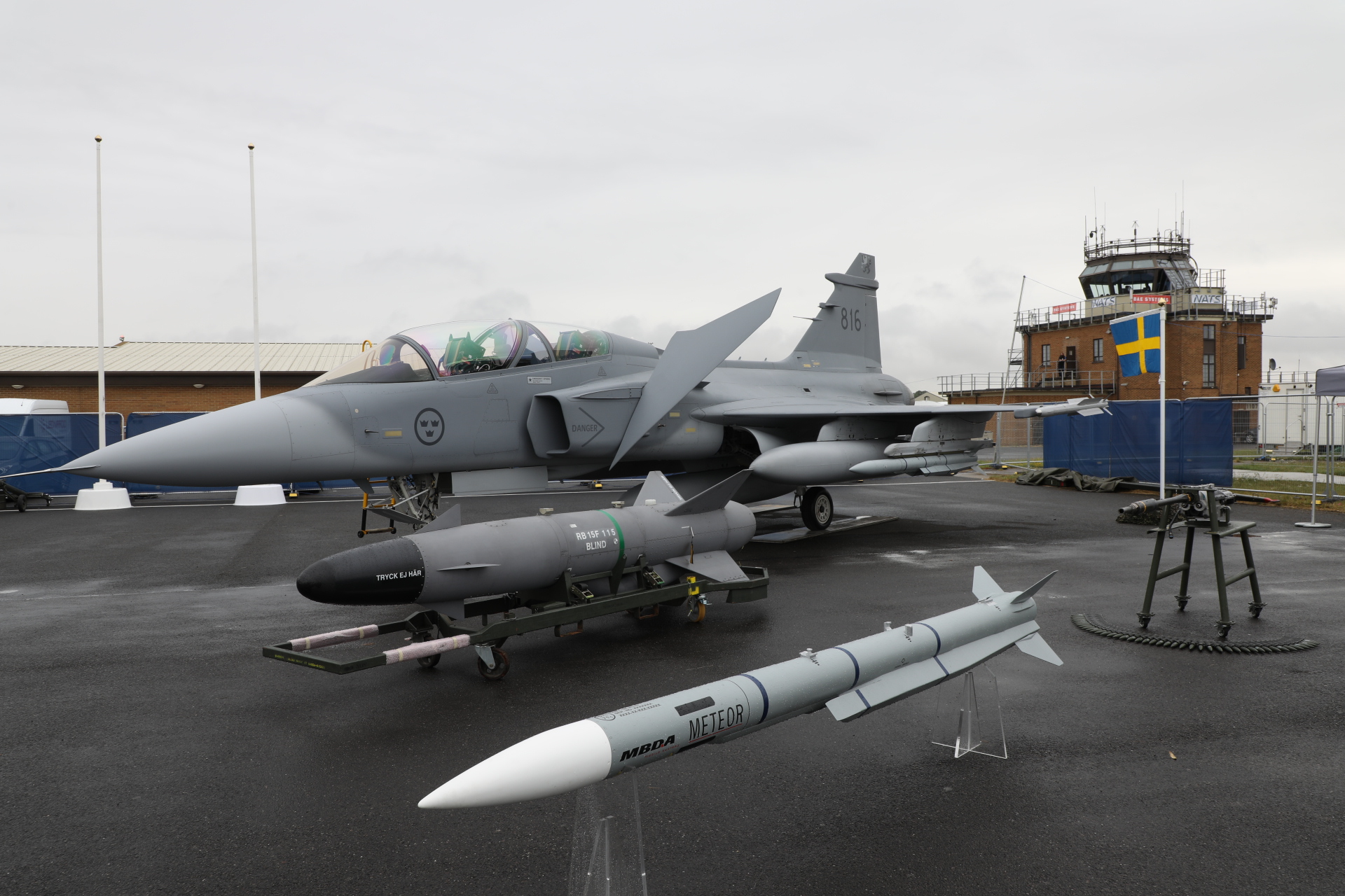 20190719160000_1P4A8363_1